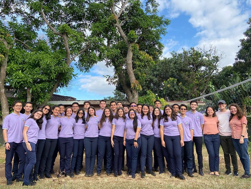 Estudiantes, CCAL, undécimo.